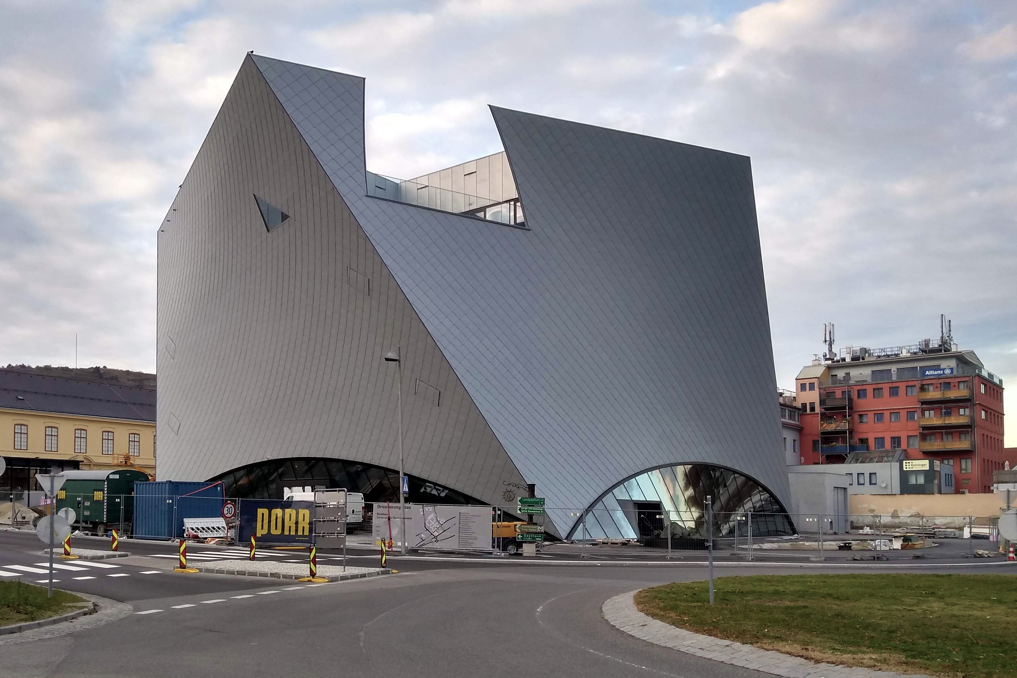 Landesgalerie Niederösterreich in Krems an der Donau (Baustatus November 2018)